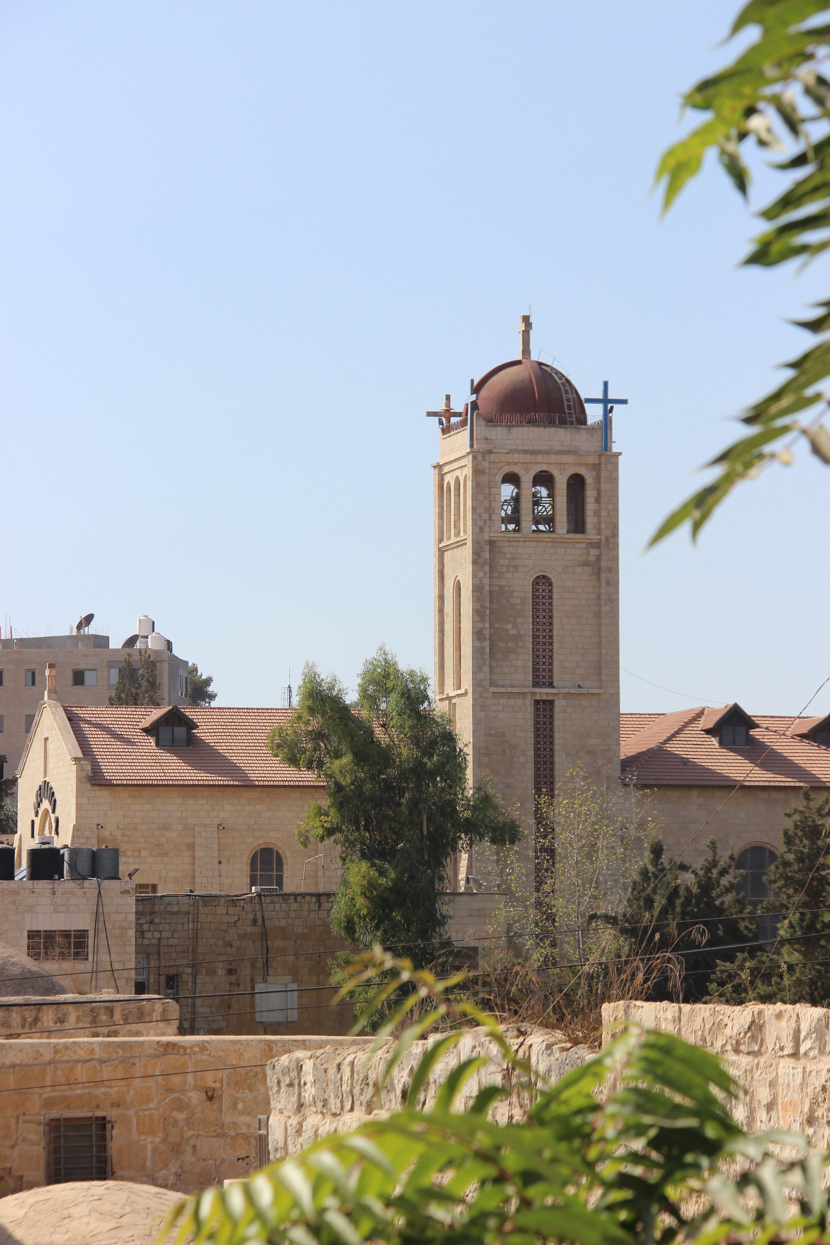 كنيسة العذراء - الحبل بلا دنس - السيدة غوادالوبة في بيرزيت.